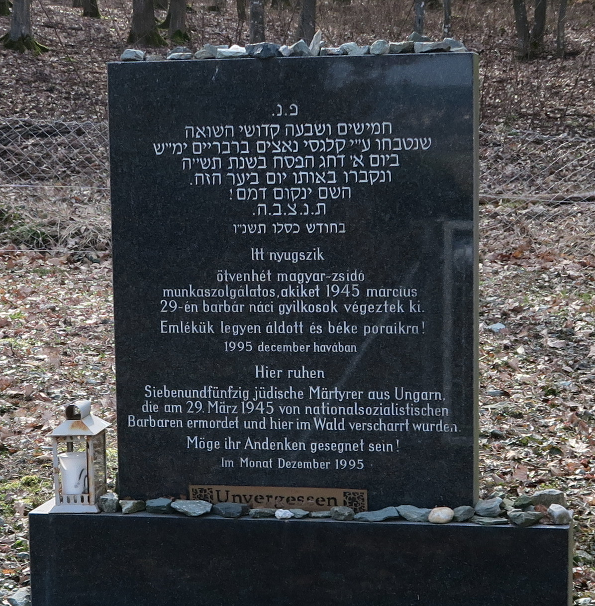 Denkmal an die ermordeten Juden in Deutsch Schützen